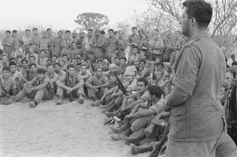 פעולות תגמול , פשיטת לילה בחאן-יונס, מבצע "אלקיים". אריאל שרון מתדרך את החיילים. מקום הצילום : חאן-יונס.